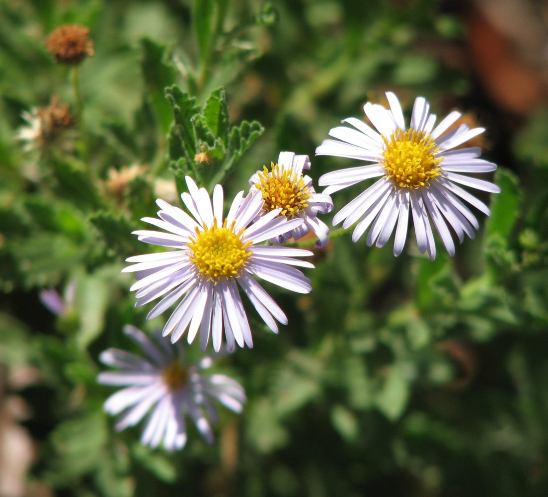 Olearia stuartii, Geelong Botanic Gardens, Victoria, Australia